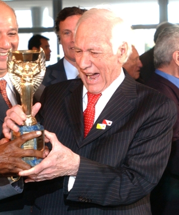 Hilderaldo Bellini